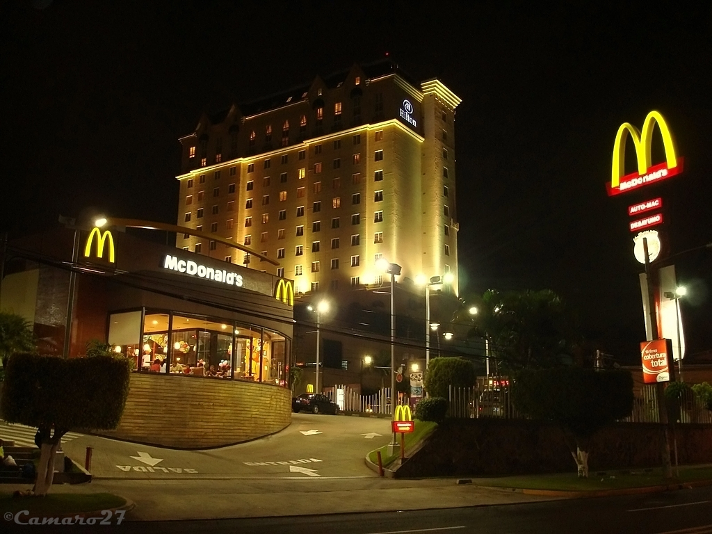 Hilton hotel, located in San Salvador, El Salvador.